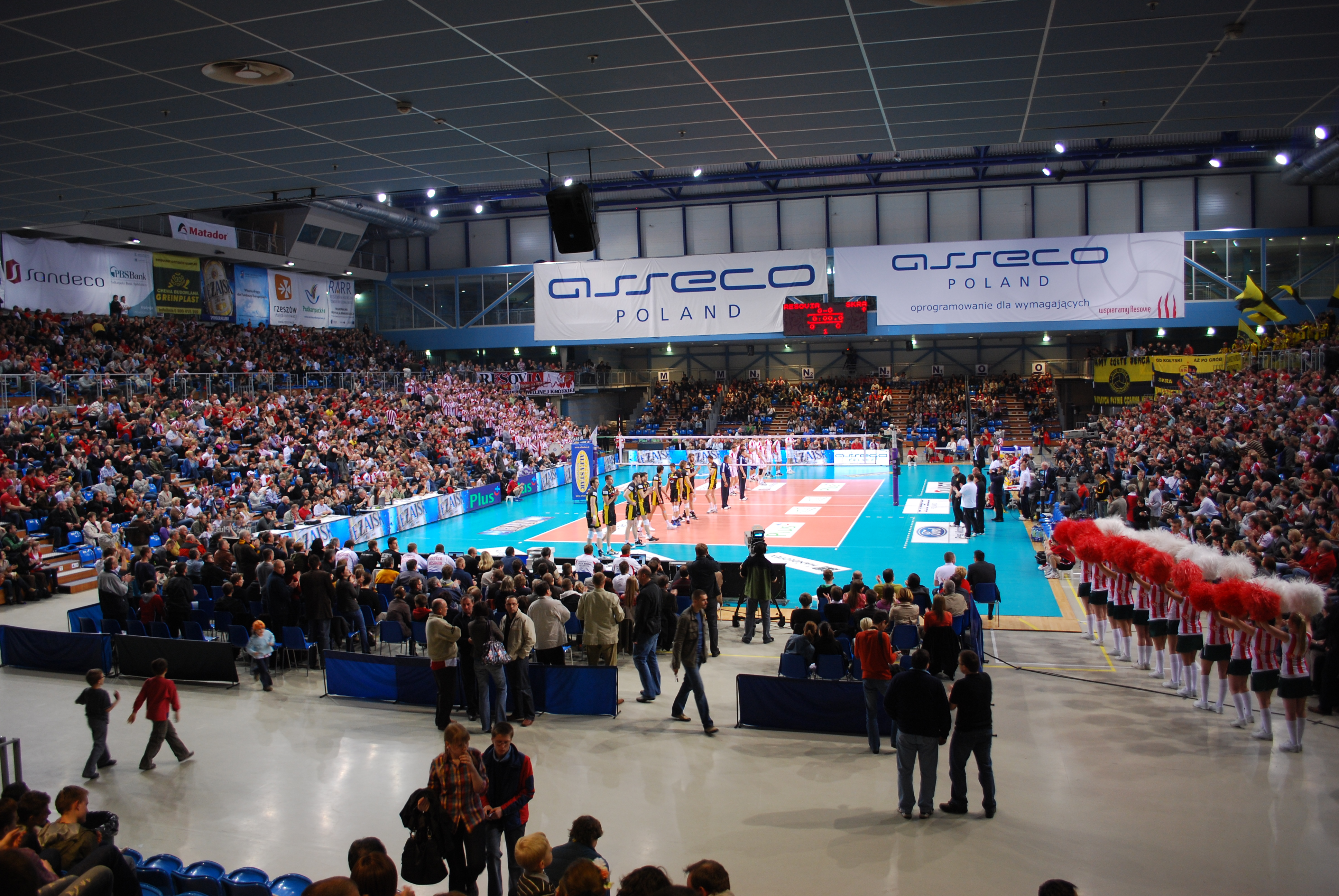 Hala Podpromie w Rzeszowie przed meczem Asseco Resovii Rzeszów ze Skrą Bełchatów.